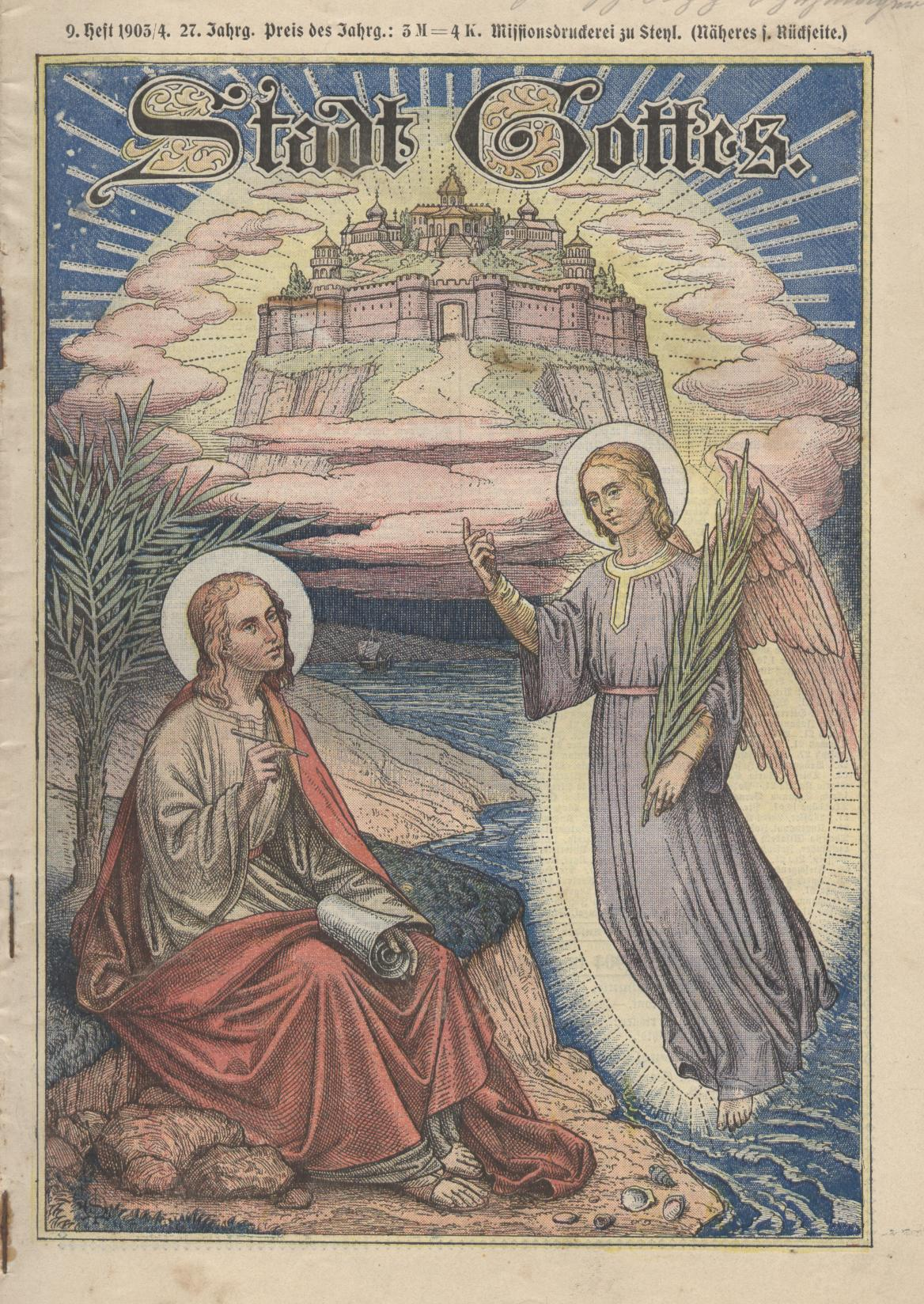 Titelblatt Stadt Gottes, Zeitschrift der Steyler Missionare, 1903/04